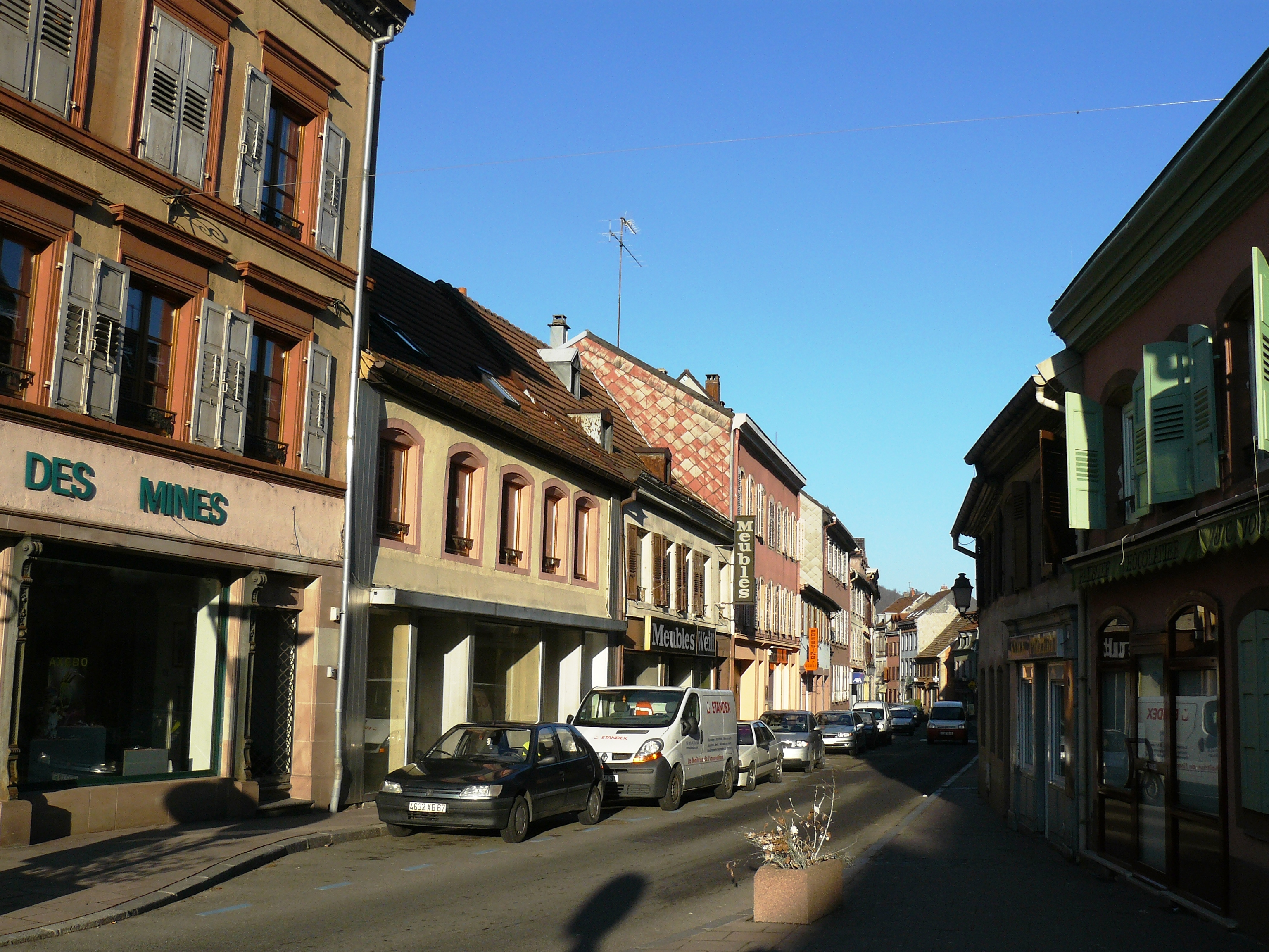 La rue Wilson à Sainte Marie-aux-Mines